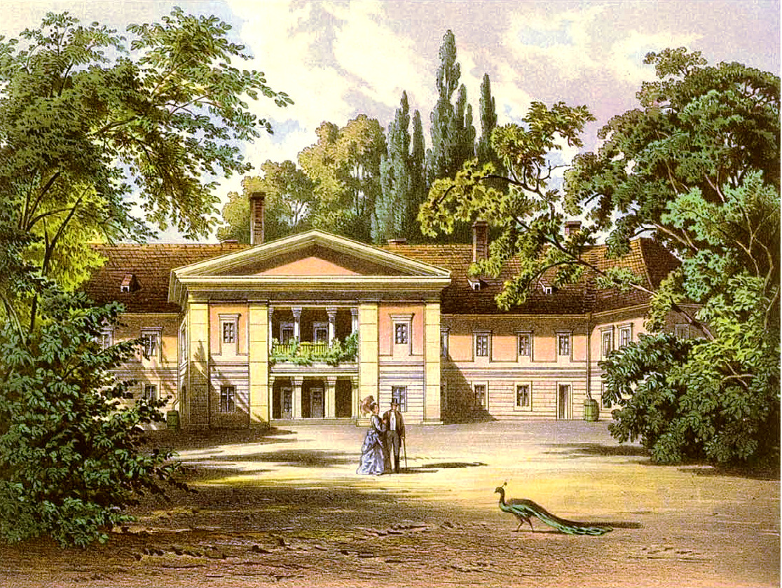 Schloss Bedra, Kreis Querfurt, Lithographie von Alexander Duncker